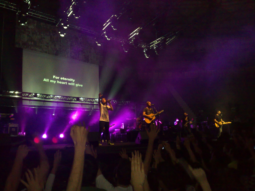 Hillsong United in Porto Alegre, Brazil, 2009